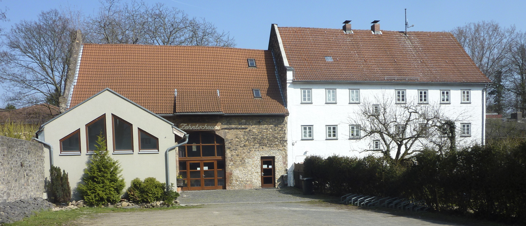 Frankfurt am Main, Stadtteil Praunheim: Zehntscheune (Mitte) mit modernem Anbau (links) und dem Herrenhaus Junkerhof in Alt-Praunheim